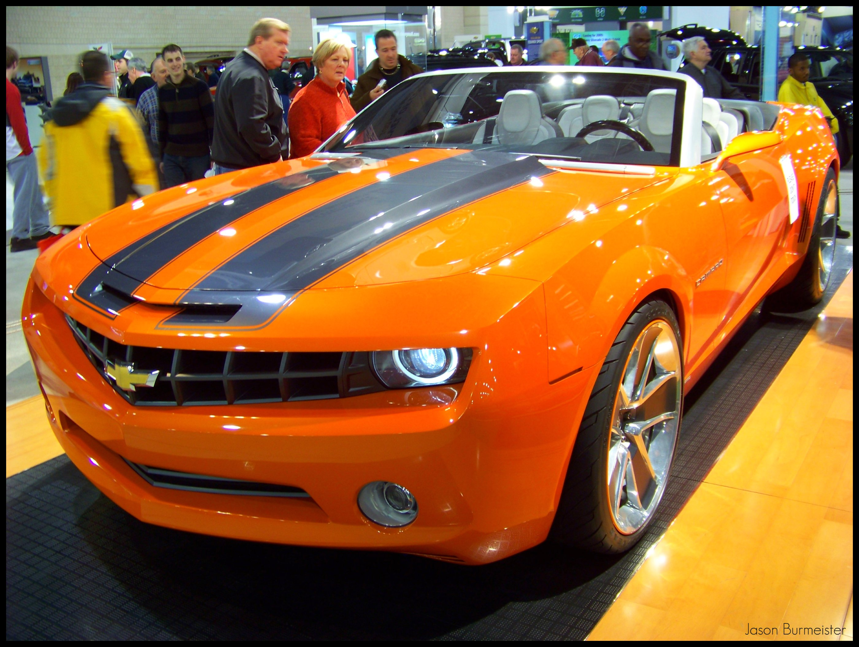 2007 Camaro Convertible Concept